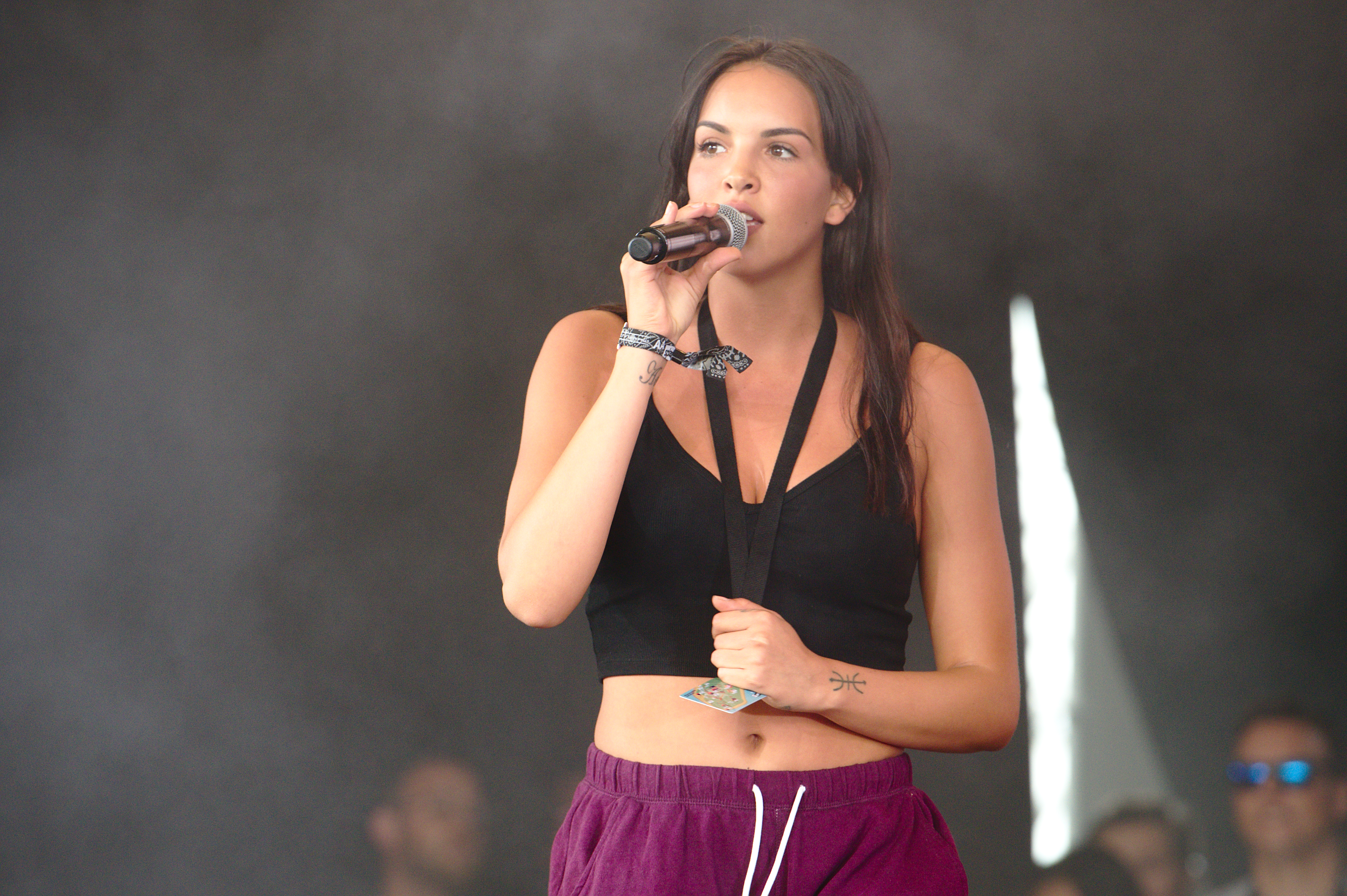 Das deutsche Rap-Duo SXTN (Juju & Nura) beim splash! Festival 20 (2017).